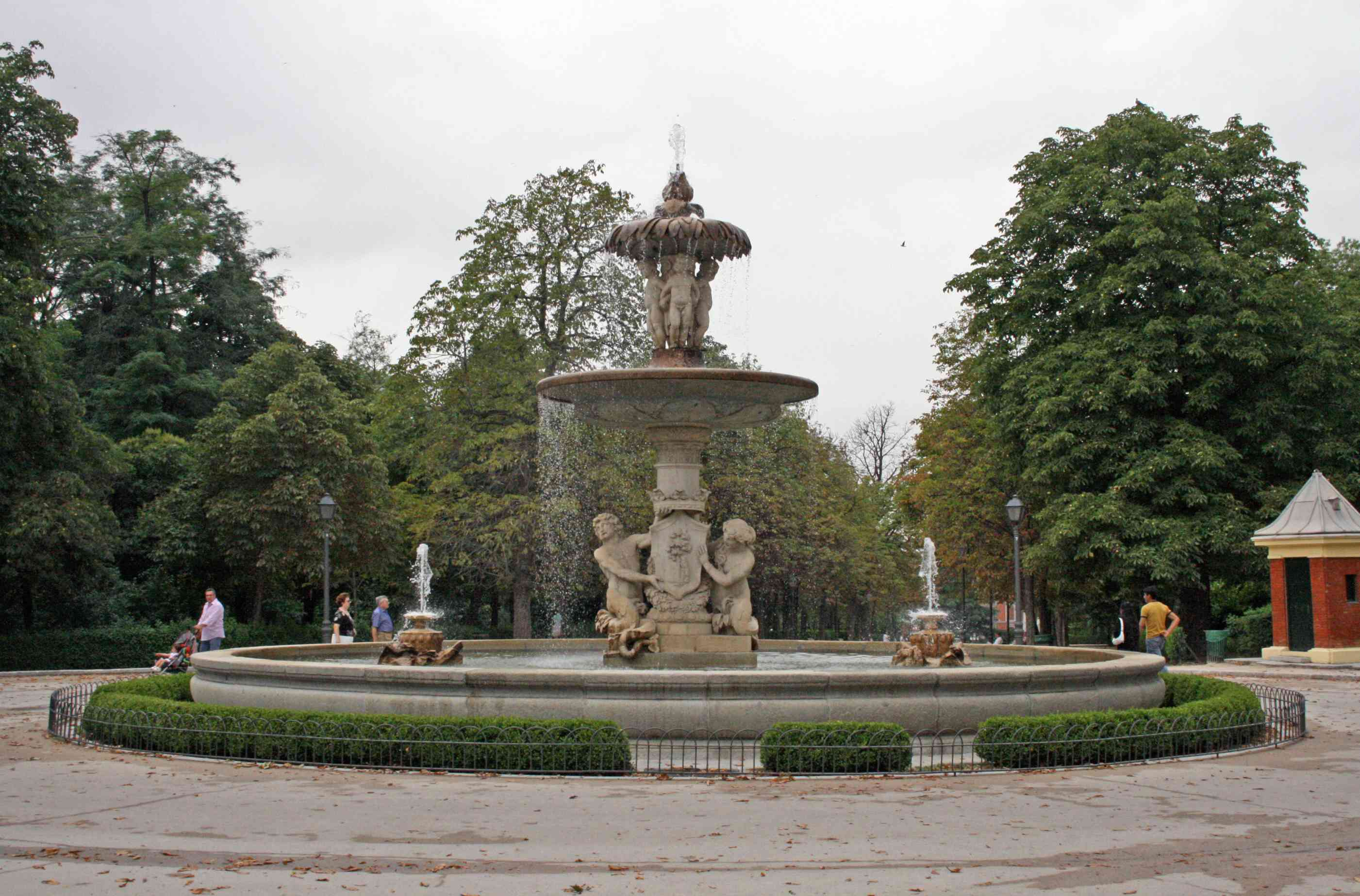 Fuente de la Alcachofa en el Parque del Retiro de Madrid (España).